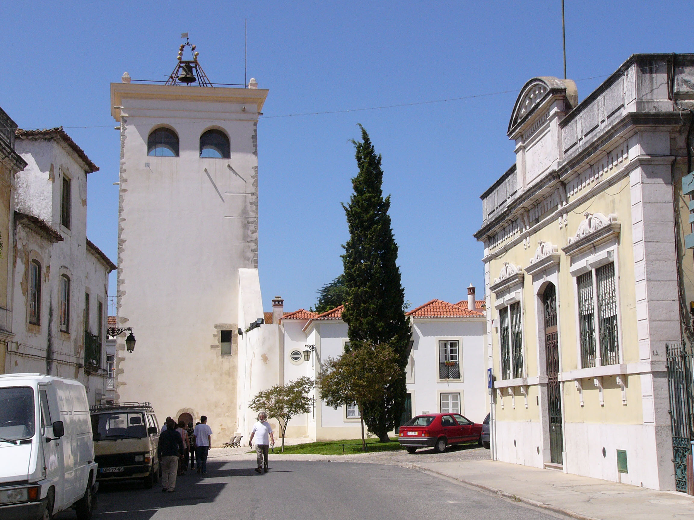 Cabaças' Tower in Santarém, Portugal